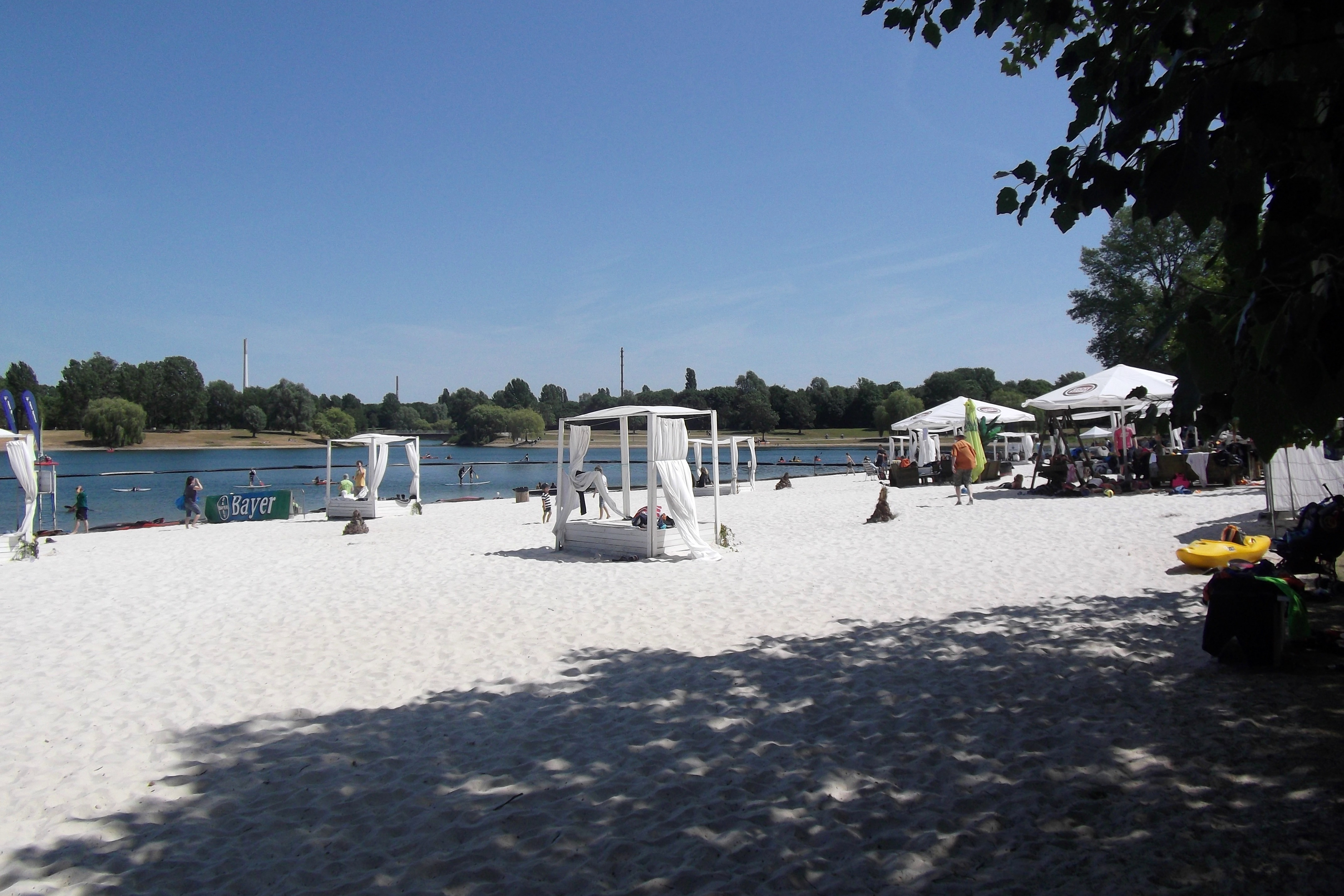 Cologne (Köln), Germany: Fühlinger See